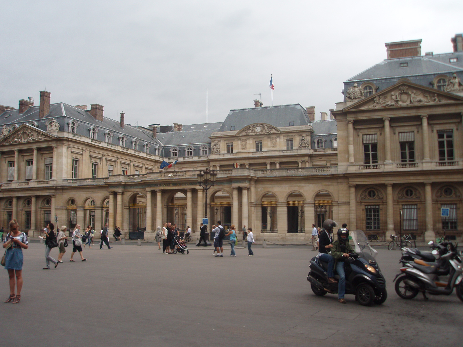 Le Palais Royal